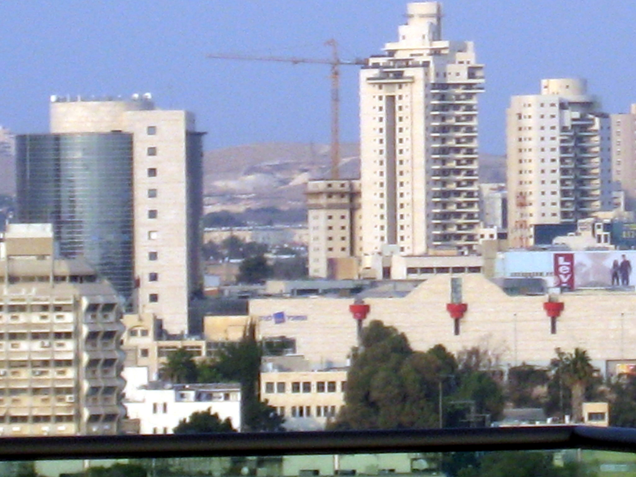 מרכז העיר